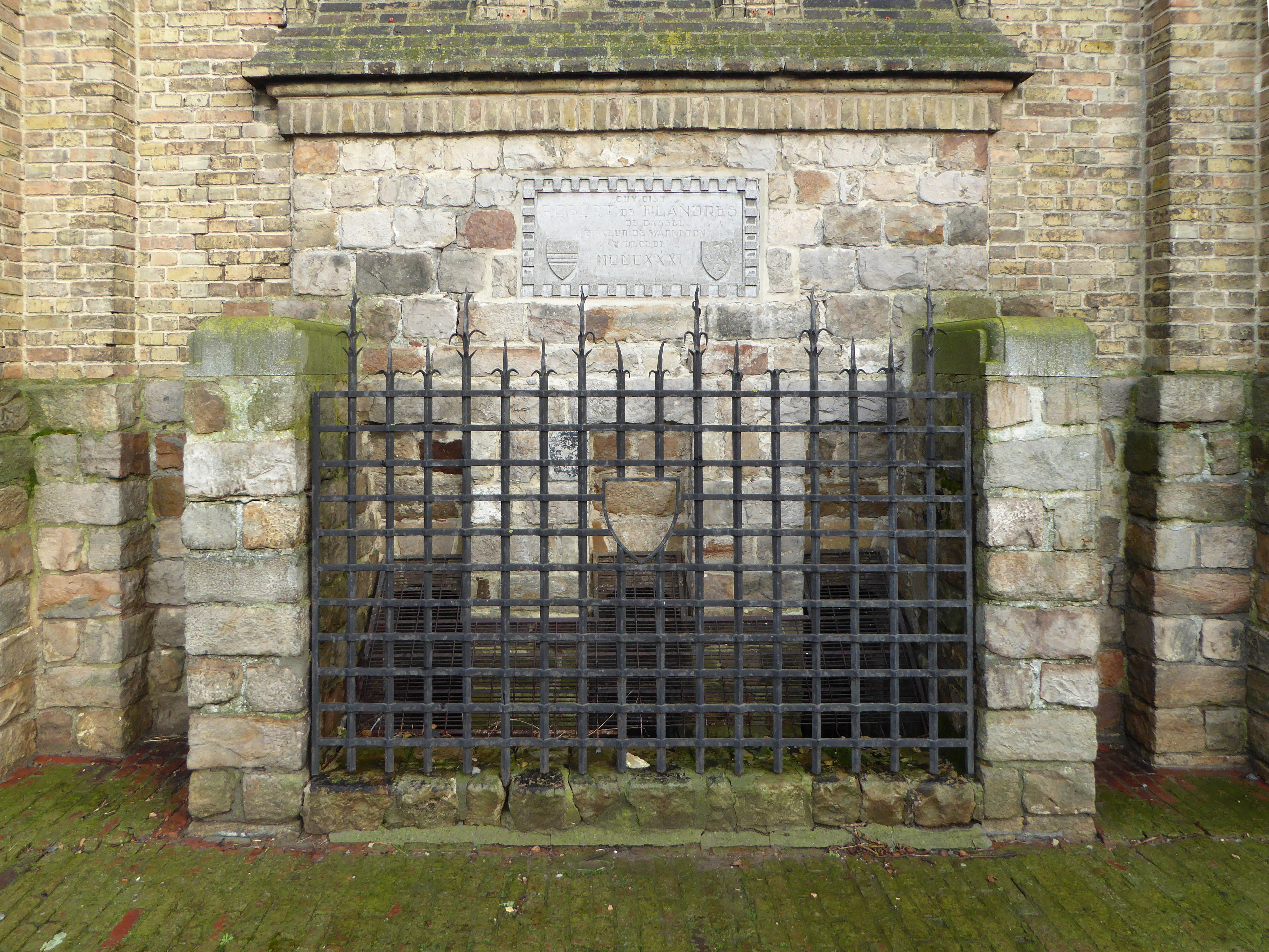 Pierre tombale du seigneur de Warneton Robert de Cassel en l'église Saints-Pierre-et-Paul